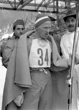 Lo sciatore islandese Oddur Petursson al termine della gara, con gli sci in mano e una coperta sulle spalle; al suo fianco un alpino lo osserva